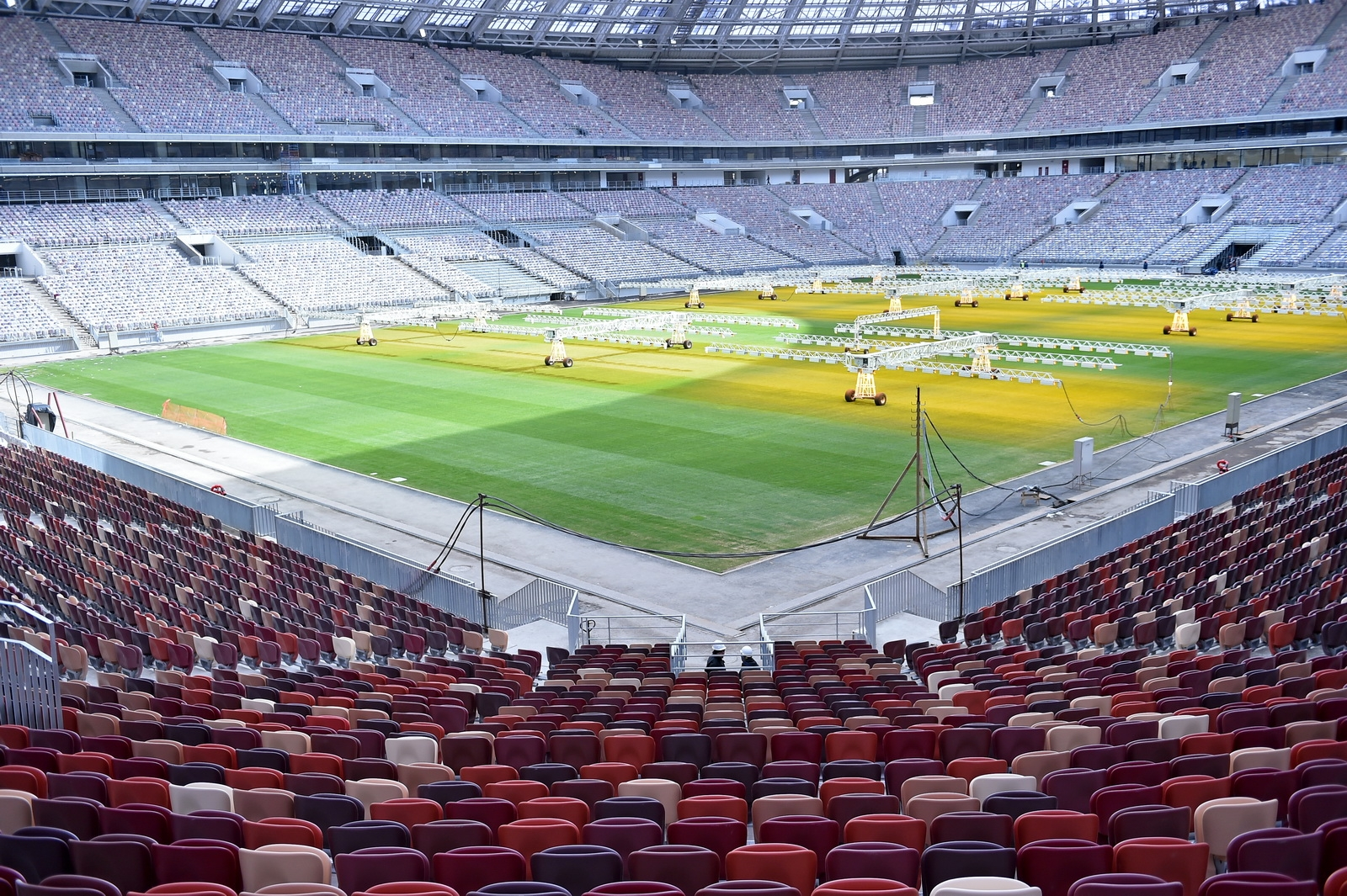 Реконструкция стадиона «Лужники» в Москве.